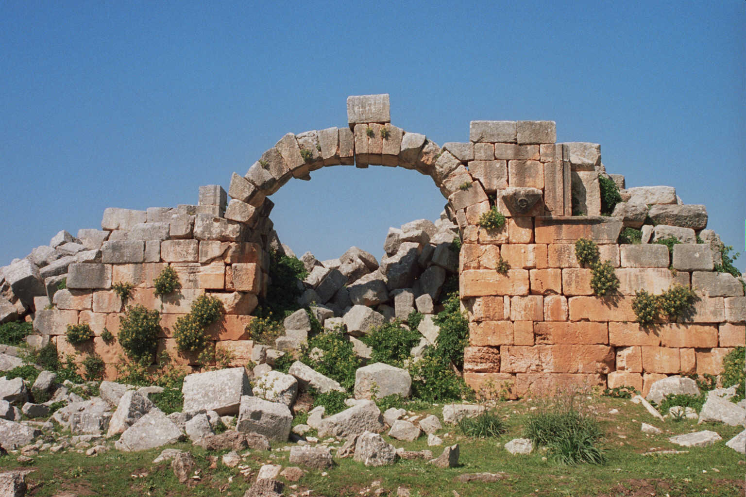 Apamea (Porta di Antiochia). Loris Romito Viaggio in Siria 2005